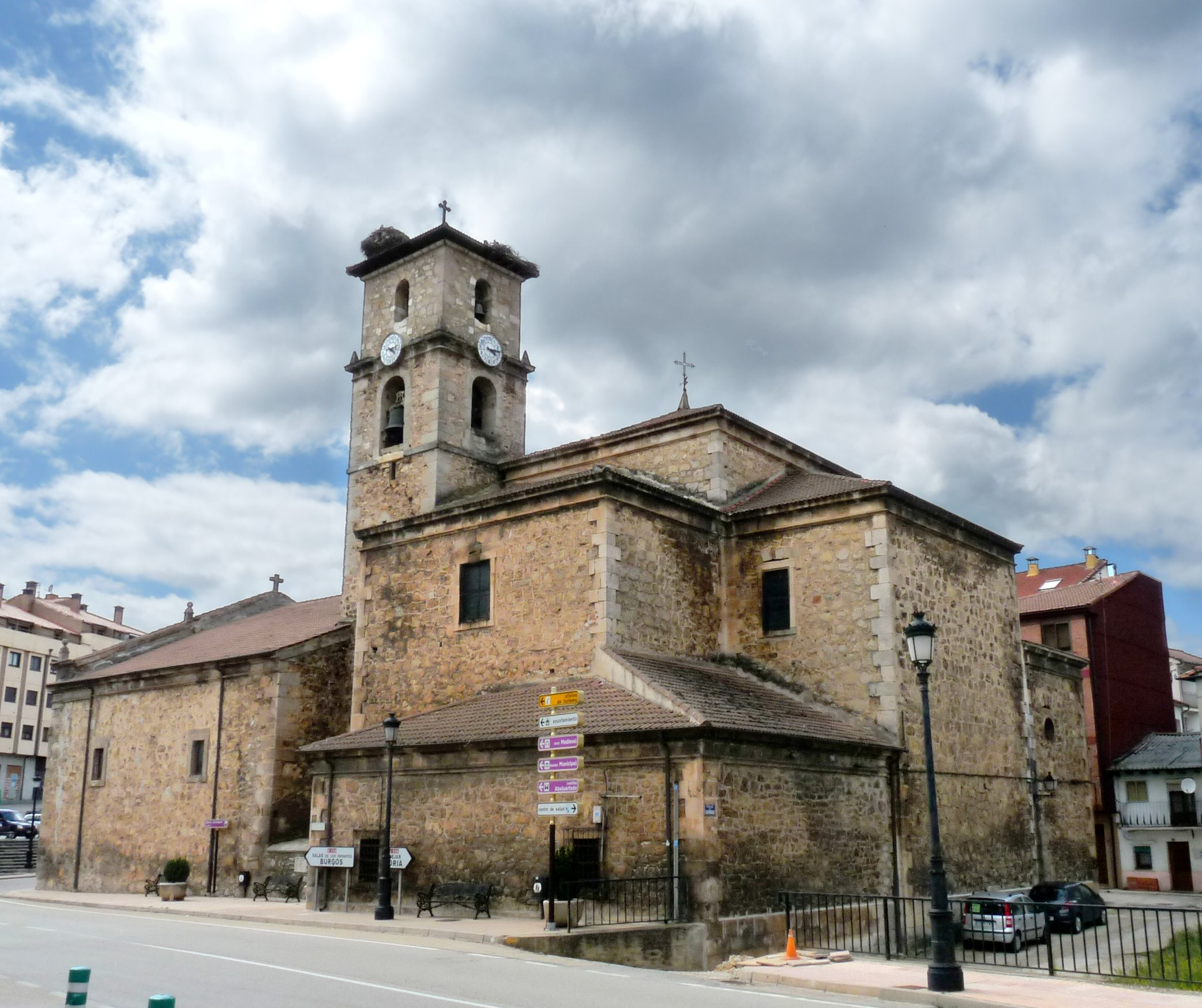 San Leonardo de Yagüe - Iglesia de San Leonardo Abad s. XVII - Estilo herreriano